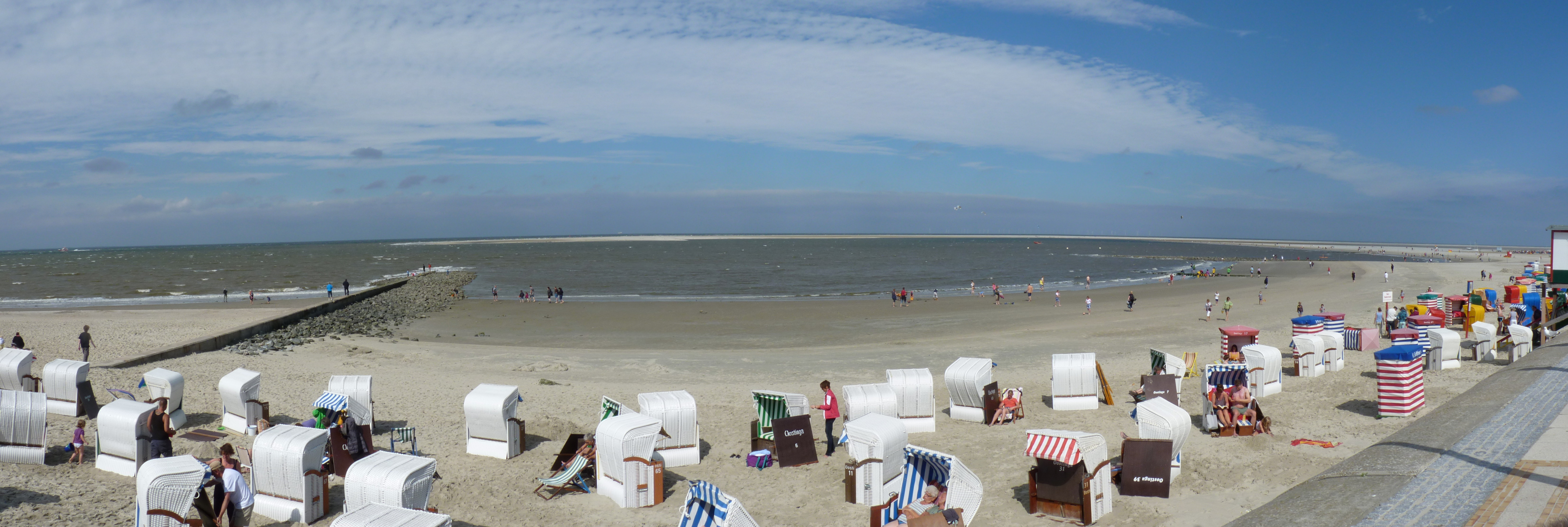 Borkumer Nordstrand